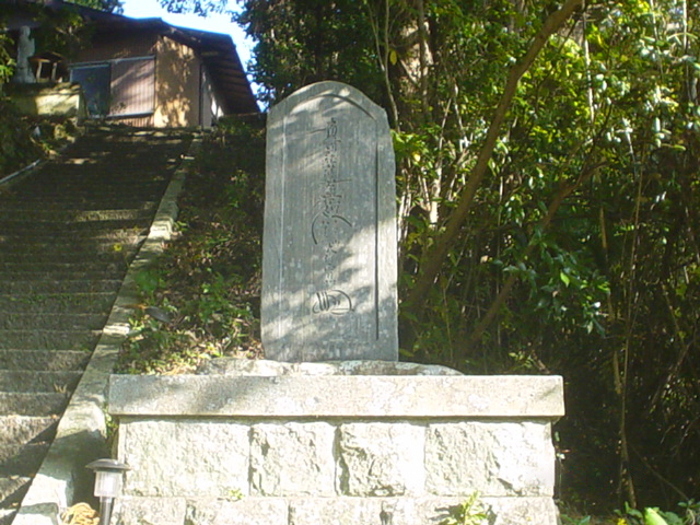 三重県熊野市にある正法寺 (熊野市)。2007/12/2 投稿者が撮影